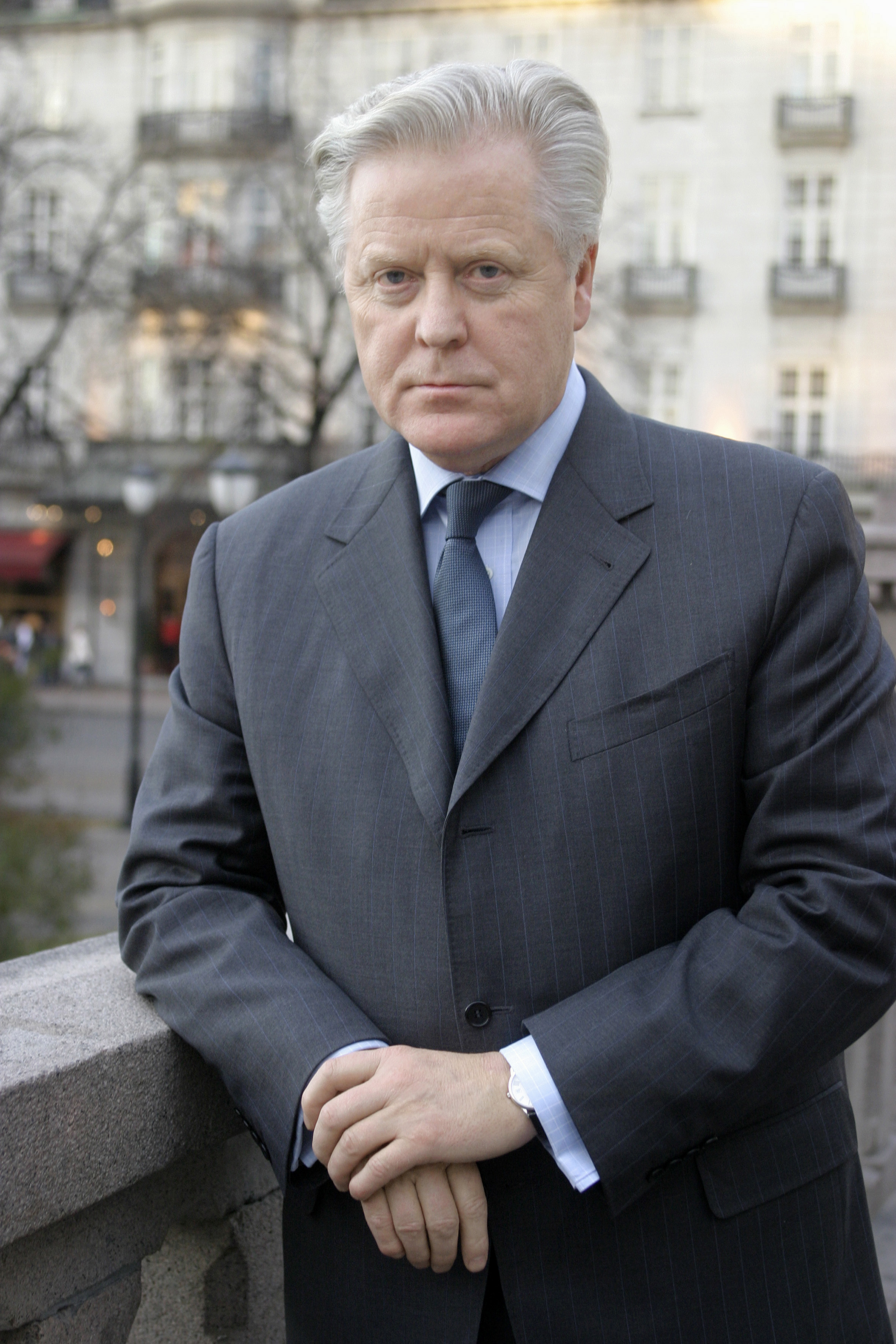 Jón Sigurðsson, verkställande direktör Nordiska Investeringsbanken (NIB)(Bilden är tagen vid Nordiska rådets session i Oslo, 2003)